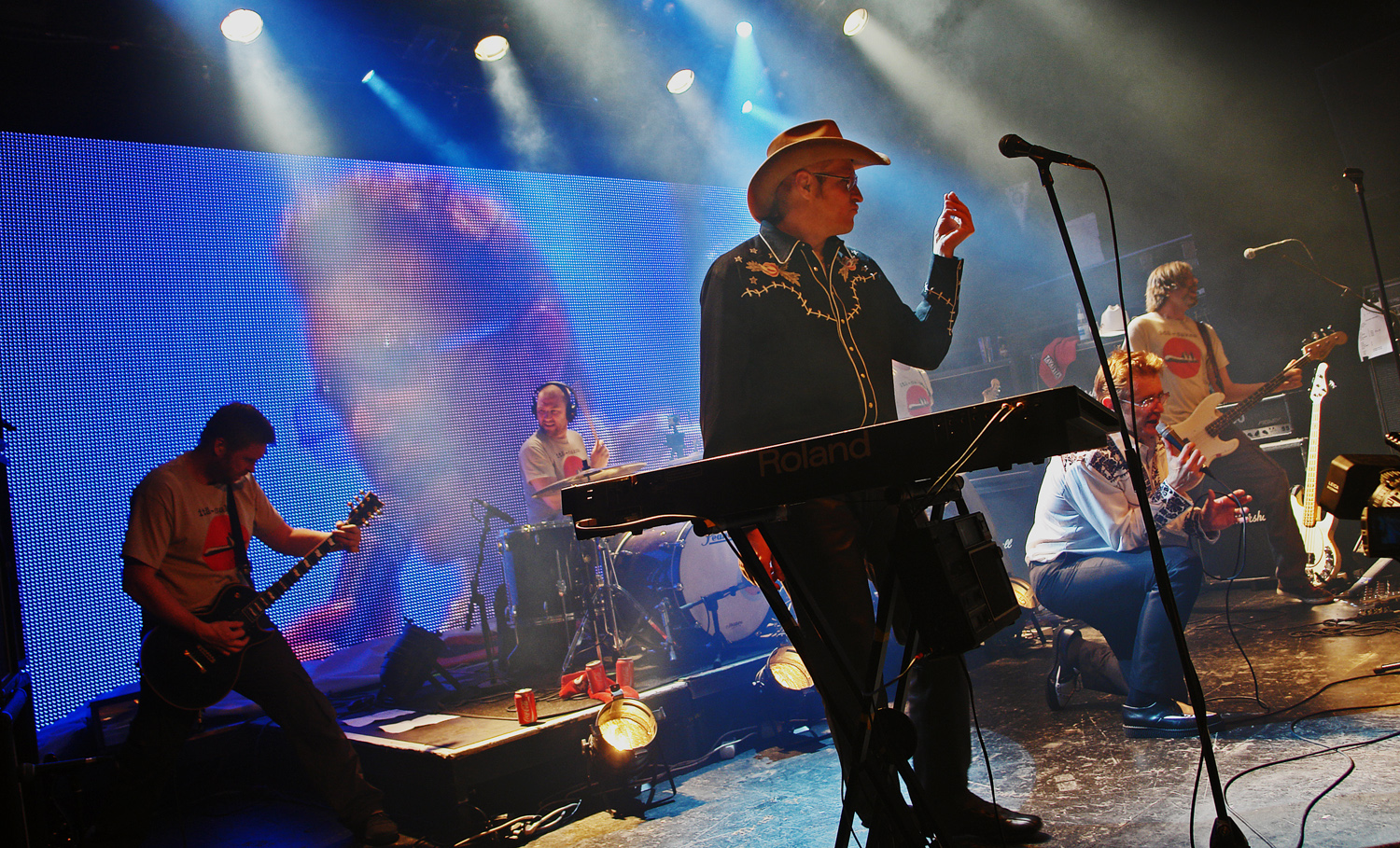 Itä-saksa live